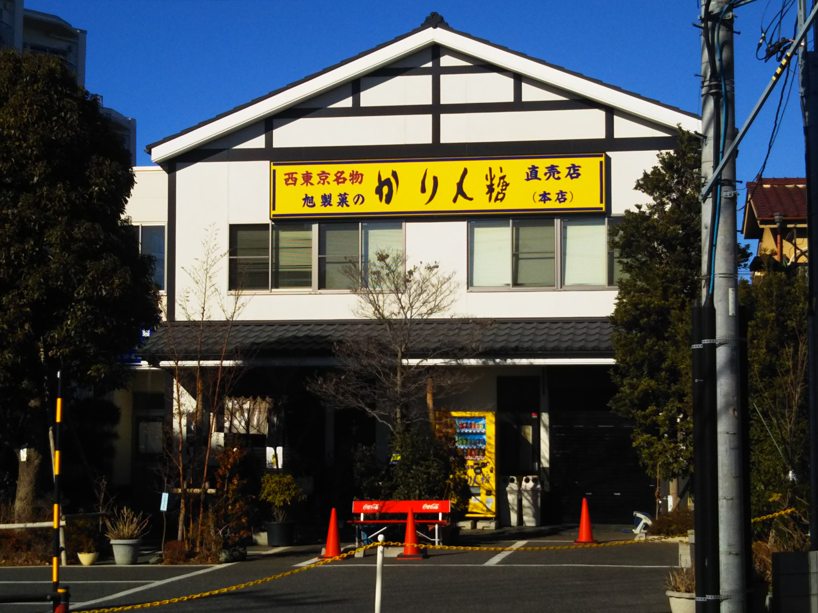 旭製菓本社工場直売店。東京都道233号線から撮影